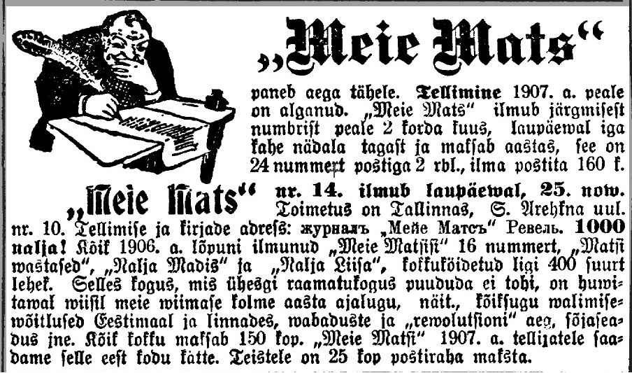 Meie Matsi kuulutus Päewalehes, nr 266, 25 november 1906